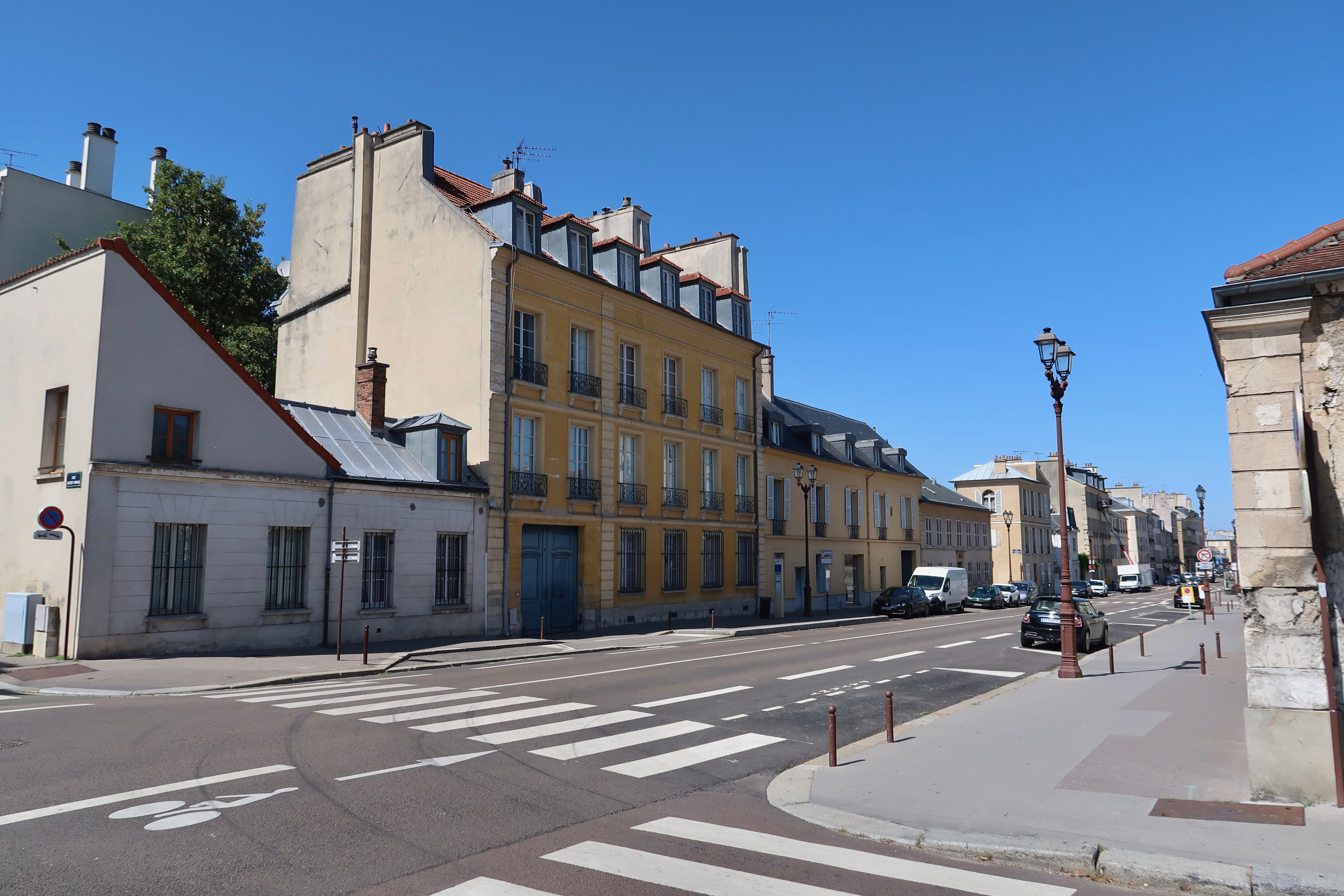 Rue Royale à Versailles (Yvelines).